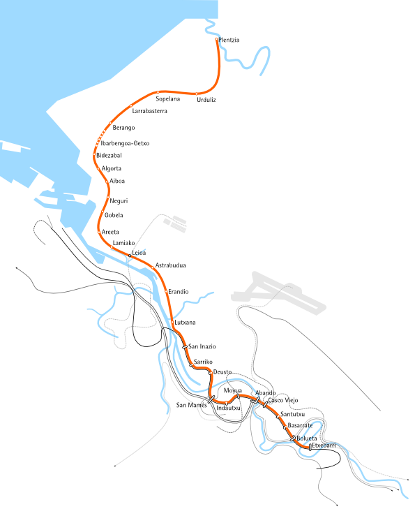 L1 Metro Bilbao